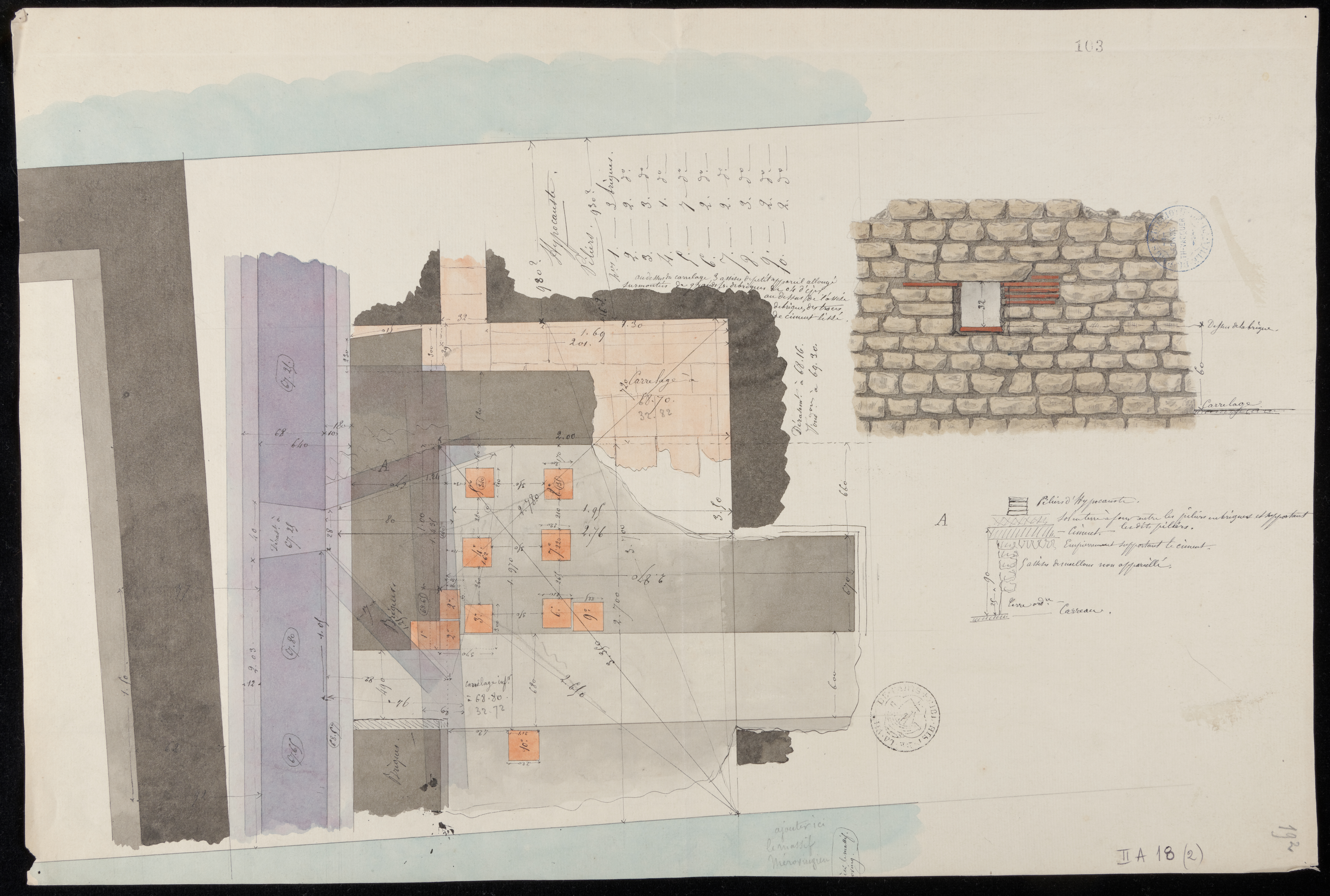 Relevé de la fouille du parvis de Notre-Dame (1847), conservé à la Bibliothèque historique de la Ville de Paris. Théodore Vacquer rapporte les vestiges d'un hypocauste.